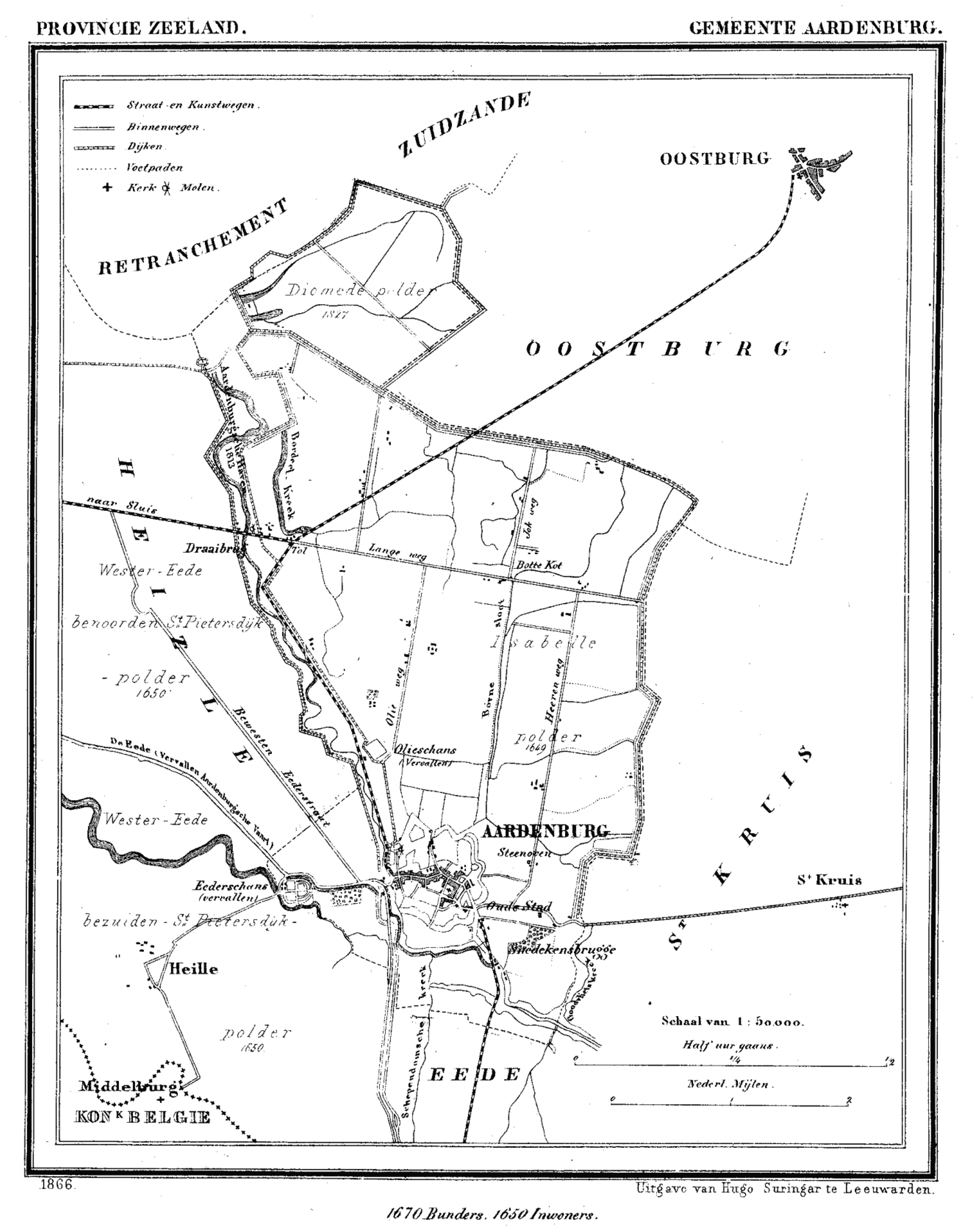 Gemeente Aardenburg, Zeeland, Nederland